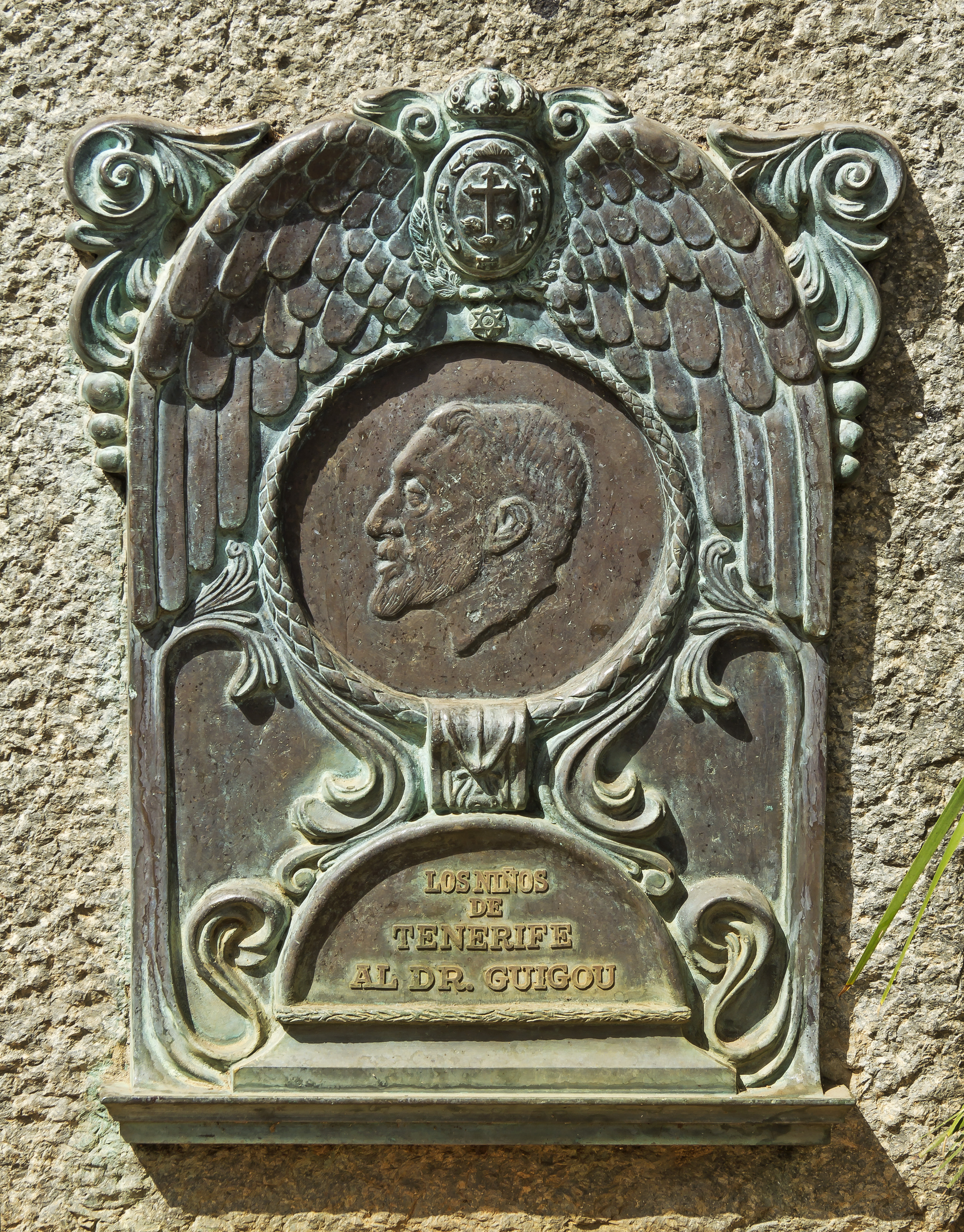 Plakette für Dr. Diego Guigou y Costa im Parque García Sanabria in Santa Cruz de Tenerife. Dr. Guigou gründete das erste Kinderkrankenhaus in Santa Cruz de Tenerife und setzte sich für die Entstehung des Parks ein.